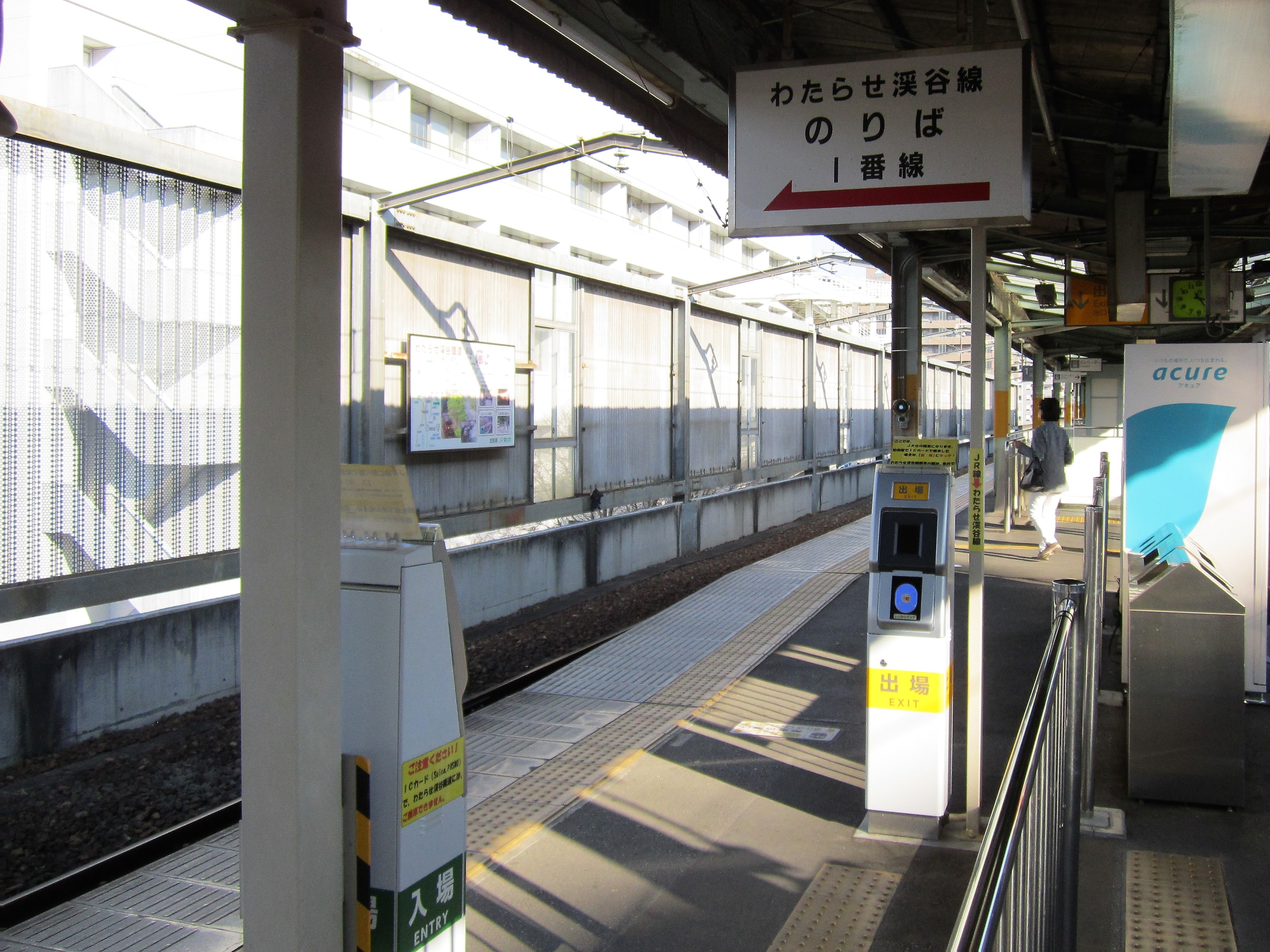 桐生駅のICカード専用中間改札